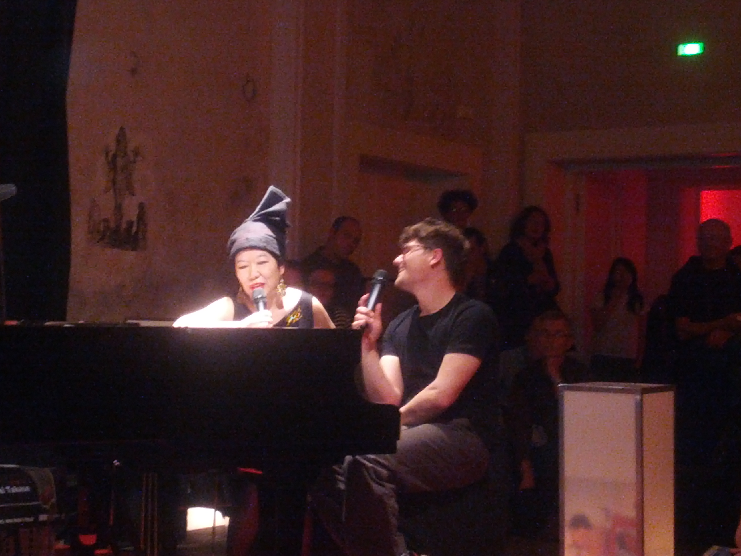 Die Pianistin Aki Takase beim Feature Ring im Festspielhaus Hellerau in Dresden